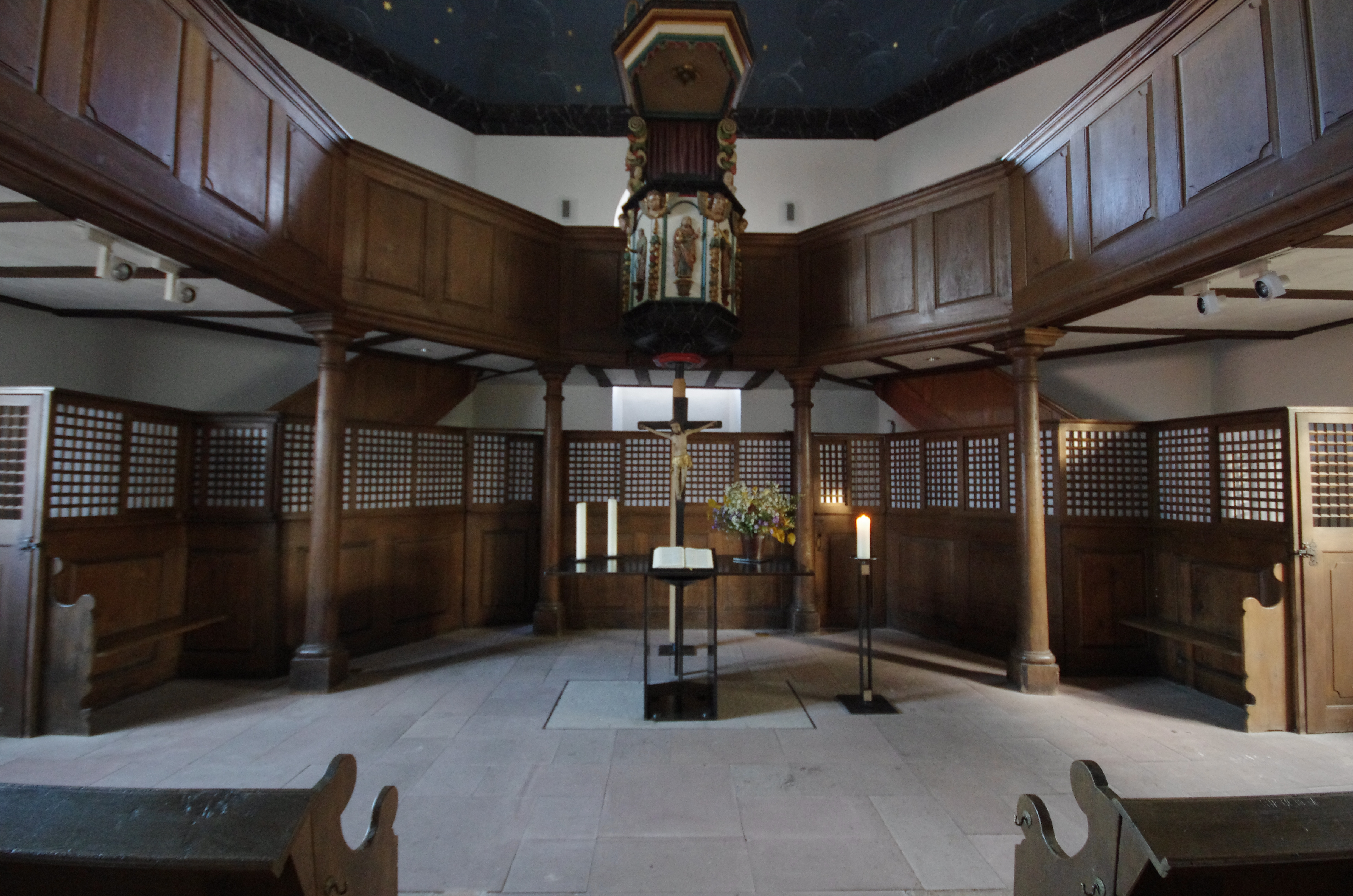 Bad Wildungen Ortsteil Altwildungen in Hessen. Der Altar der Kirche, darüber die Kanzel.